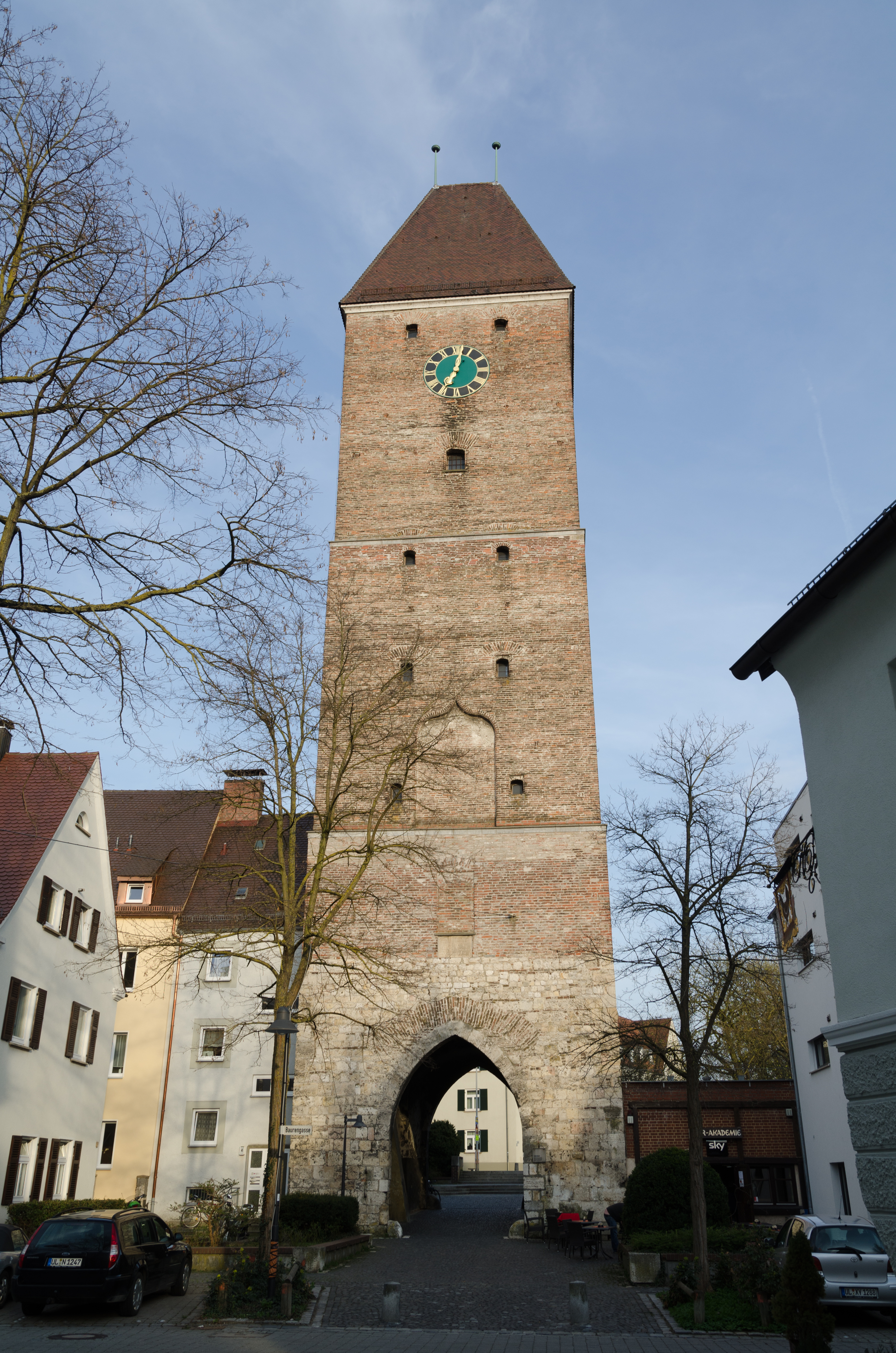 Gänstor in Ulm